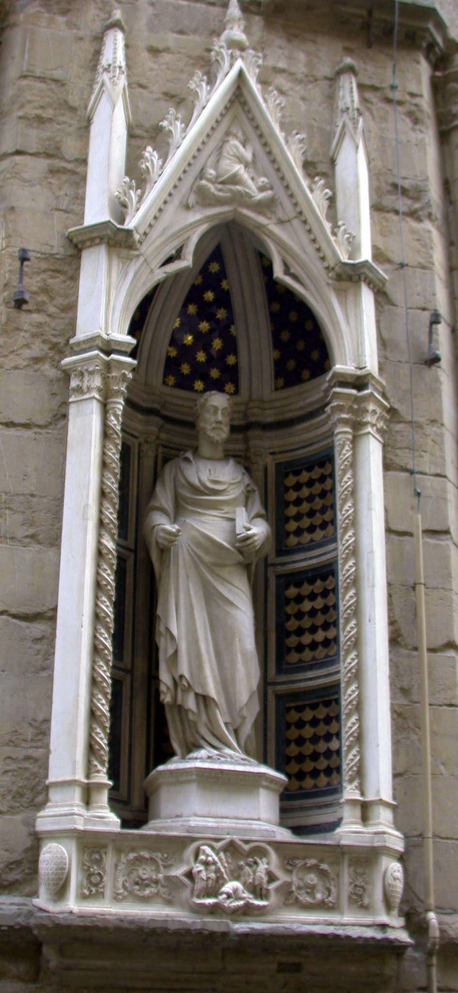 Firenze, Orsanmichele, Tabernacolo dell'arte dei Pellicciai, con San Giacomo di Lamberti (?). Foto personale aprile 2005.